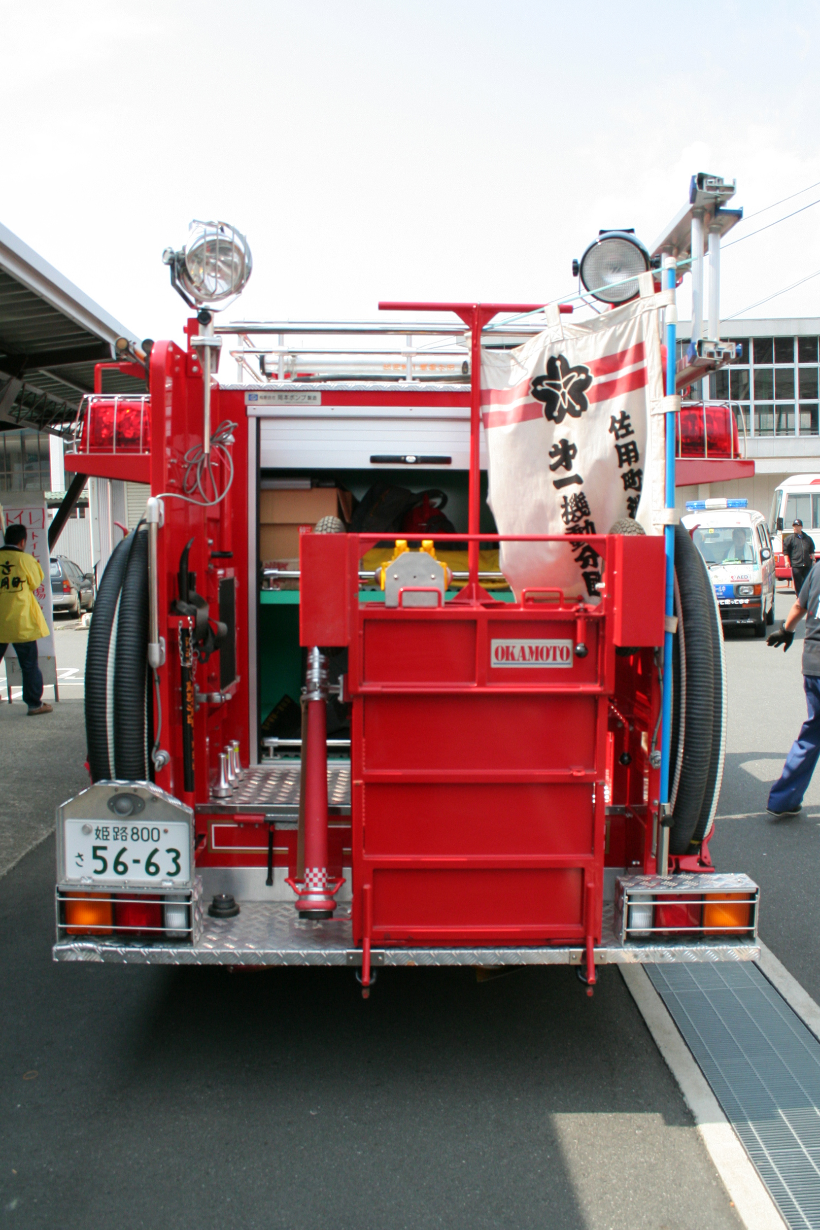 兵庫県佐用郡佐用町佐用にある佐用町役場にて2009年4月12日に開催されたカー・フェスティバル「ヴァリオ・ストラーダ2009」にて展示された自動車など。車はいずれも佐用町役場にて撮影。 後部より撮影。